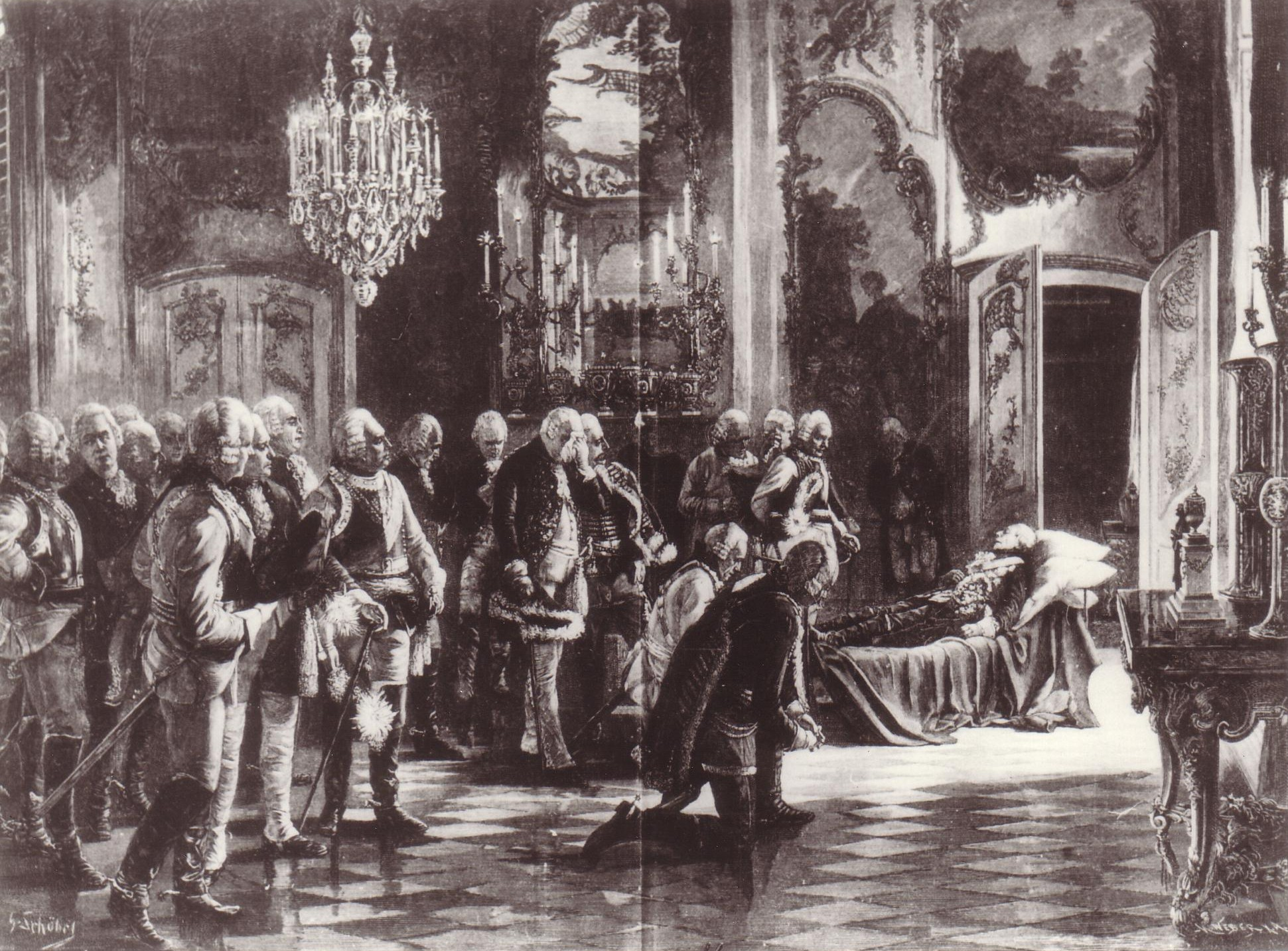 Georg Schöbel (1860-1931): Abschied der Generäle am Totenbett Friedrichs d. Gr. am 17.08.1786, Lithografie.